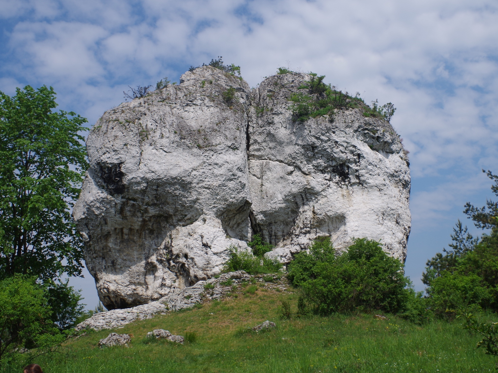 Skała Skrzynia w obrębie Straszykowych Skał w Ryczowie